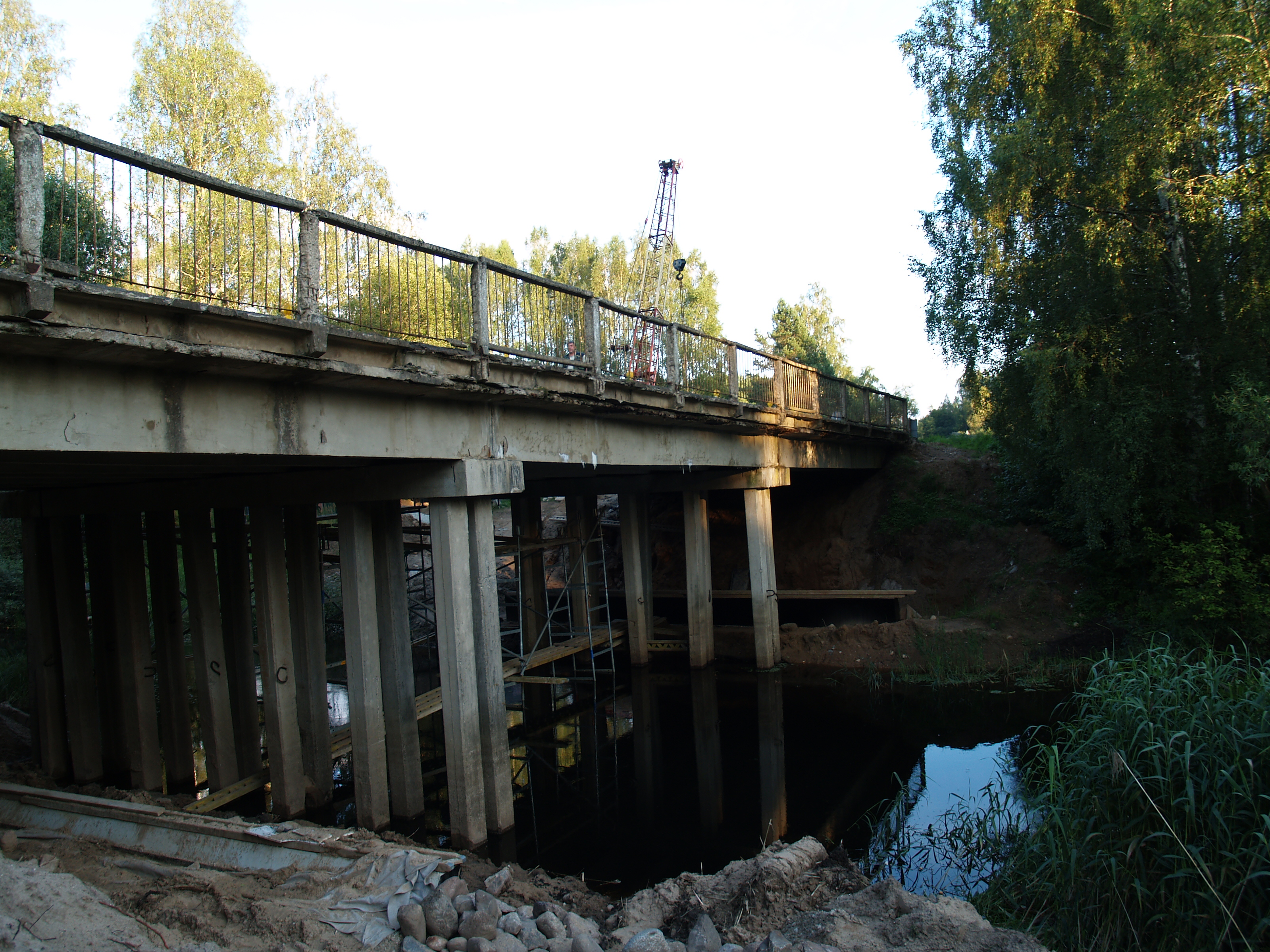 Sild üle Säde jõe Valmiera ja Ruhja vahelisel maanteel